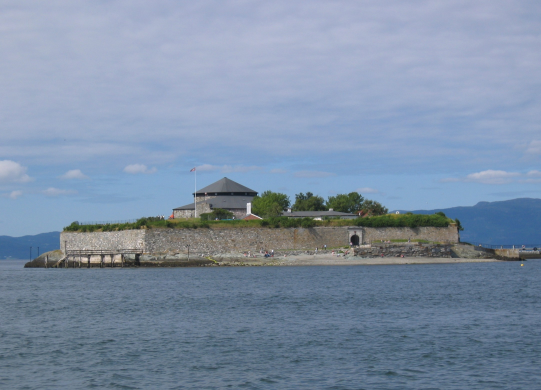 Munkholmen ved Trondheim fra sør. Fotografen, J. Morten Dreier, skal alltid krediteres.